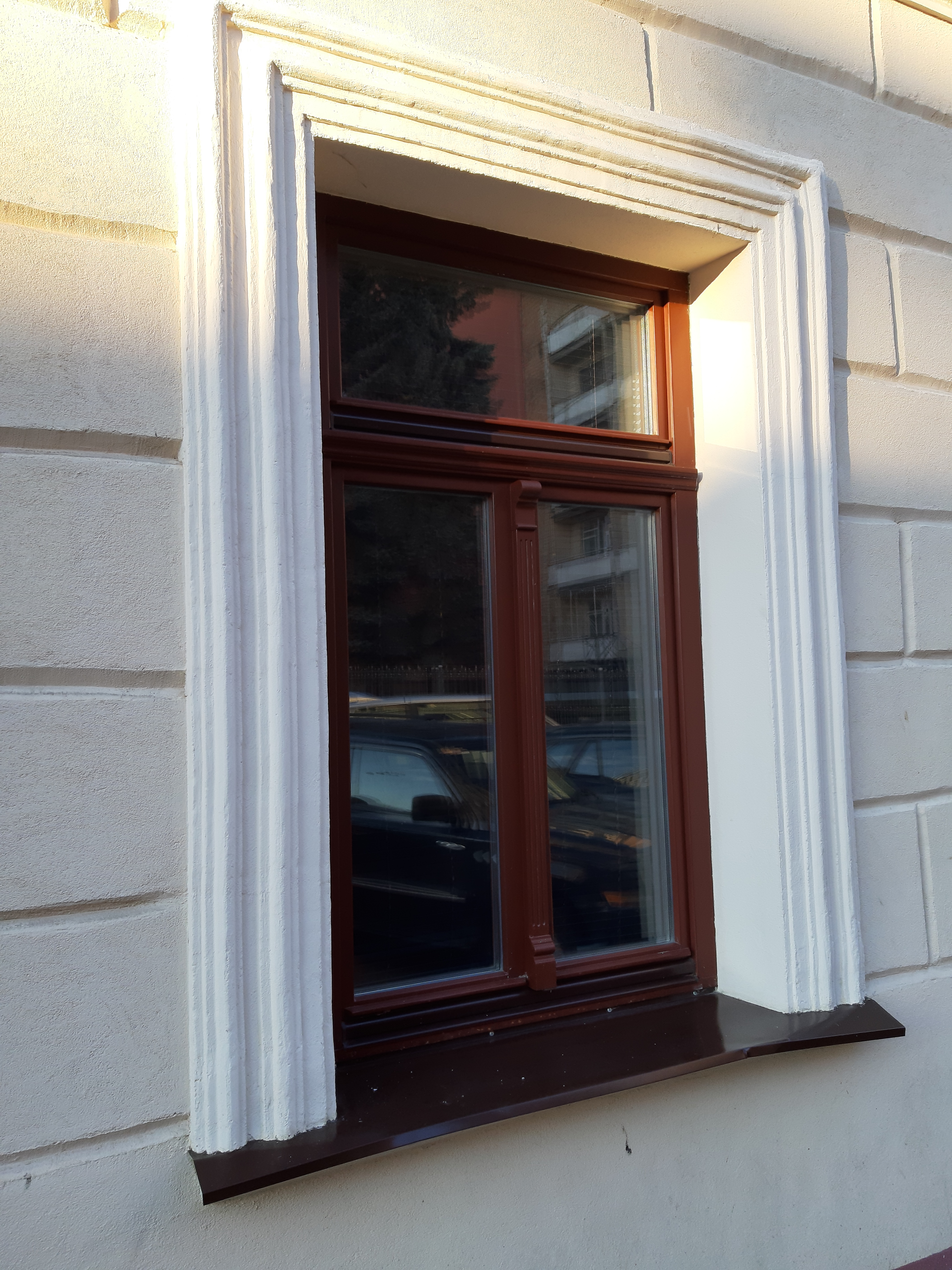 Мінск. Між плошчай Свабоды і Гарадскім Валам